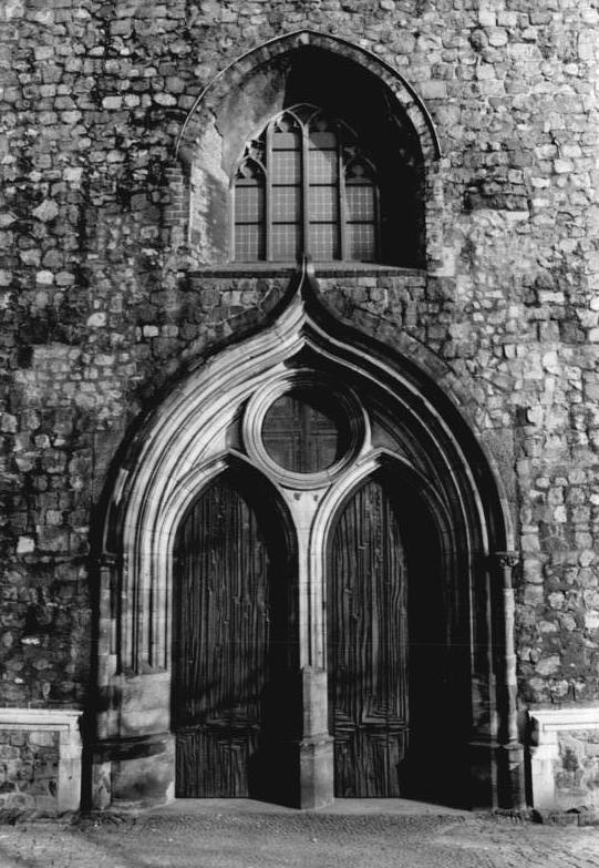 ADN-ZB-Grimm-18.2.84-mü-Berlin: Einenreizvollen Kontrast bilden das gotische Hauptportal der Marienkirche in der Karl-Liebknecht-Strße und die vom Berliner Künstler Achim Kühn geschaffene modernen Tore. Das historische Bauwerk wurde am 3. Januar 1294 erstmal urkundlich erwähnt.